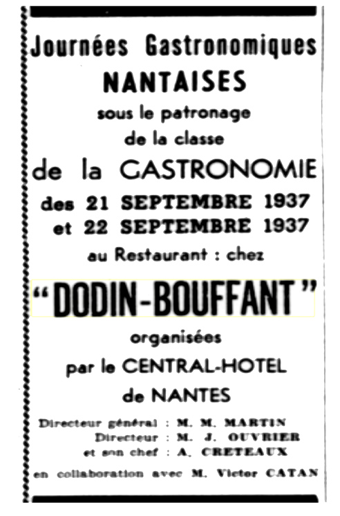 restaurant Dodin Bouffant en 1927